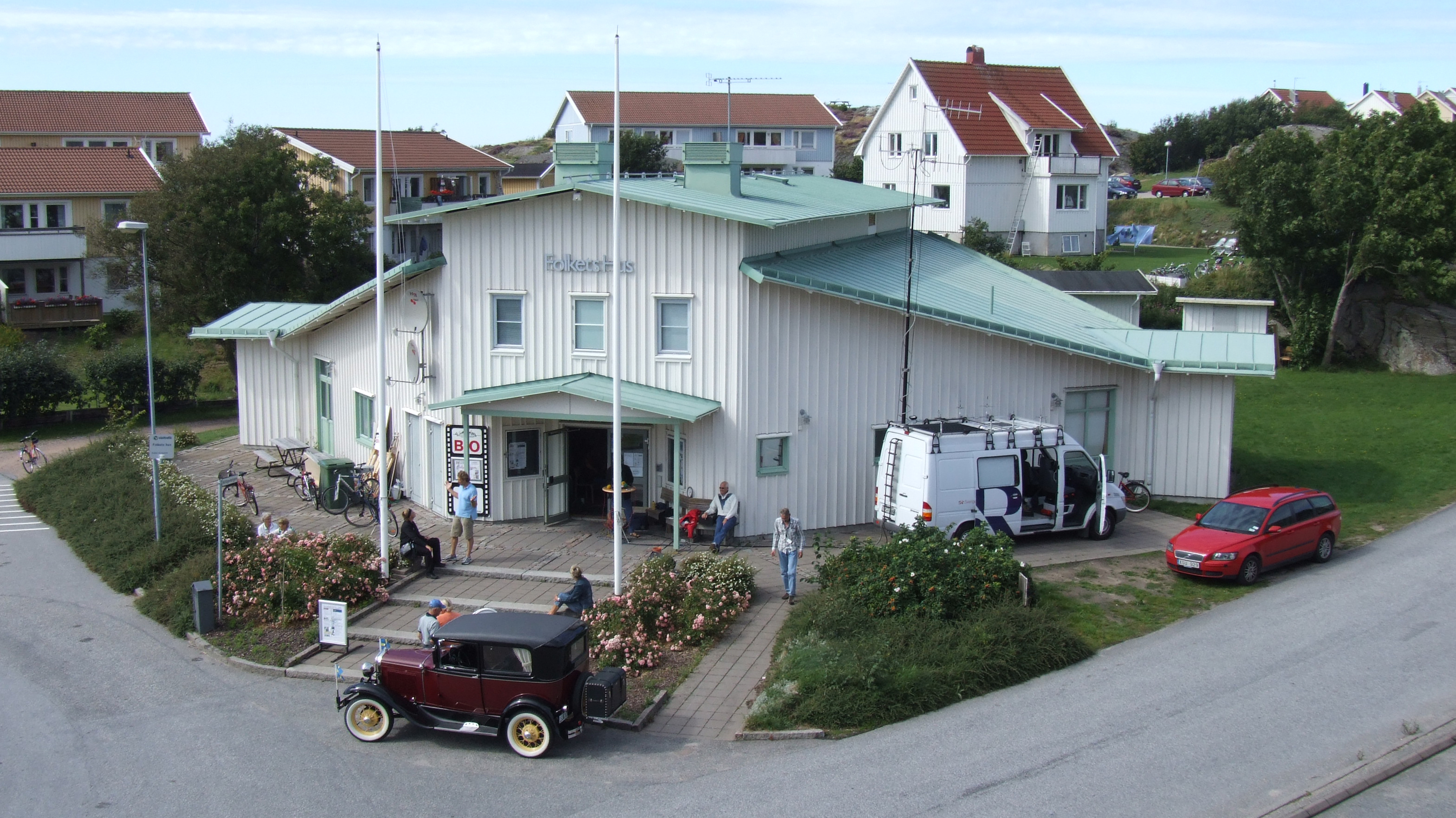 Skaftö Folkets Hus, Grundsund